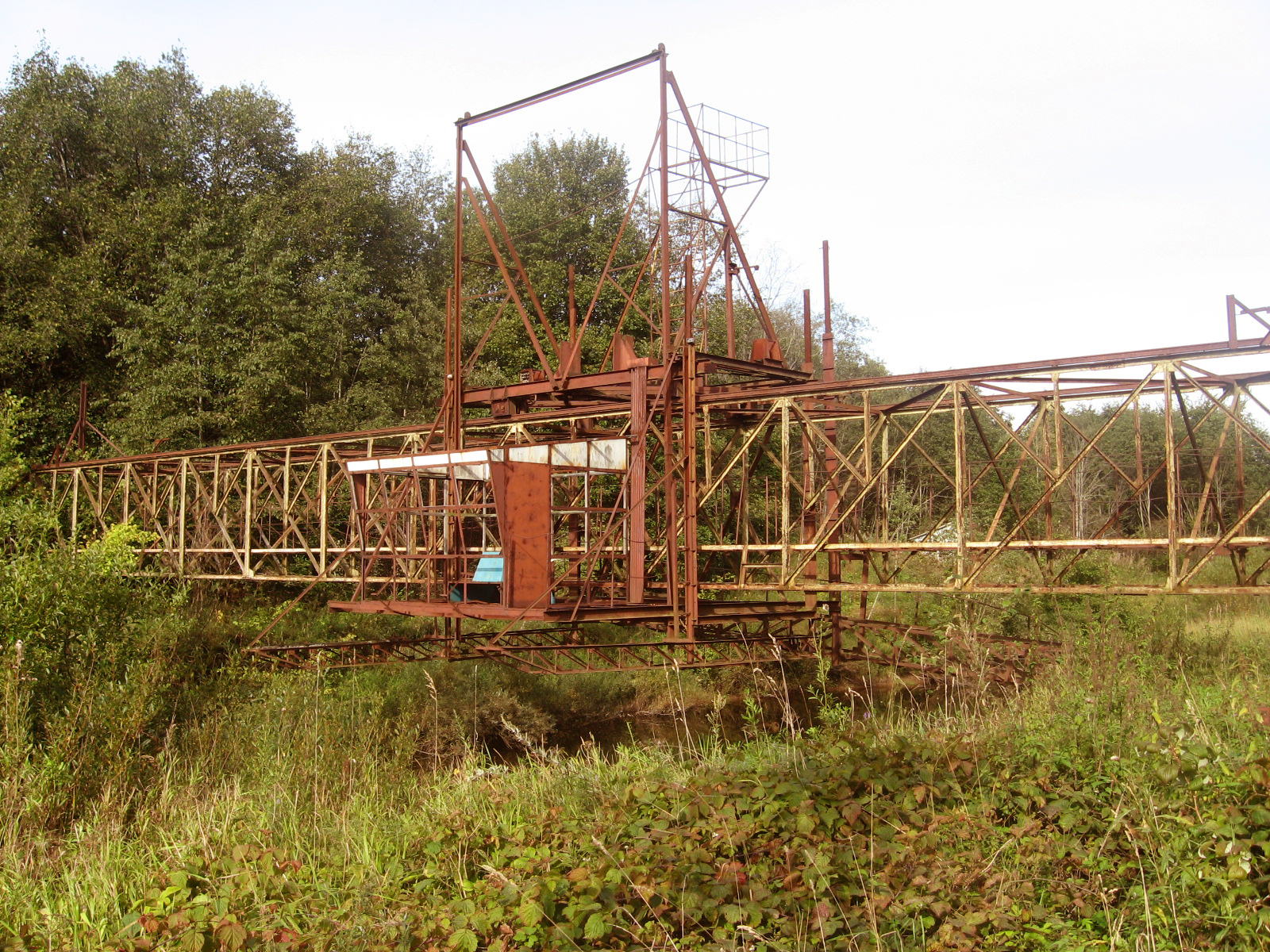 Экспериментальная установка на р. Полометь. Принадлежит ВФ ГГИ